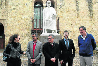 Inauguración de la estatua de Averroes el 13 de noviembre de 2014, en la que colaboró el Colegio de Médicos de Córdoba